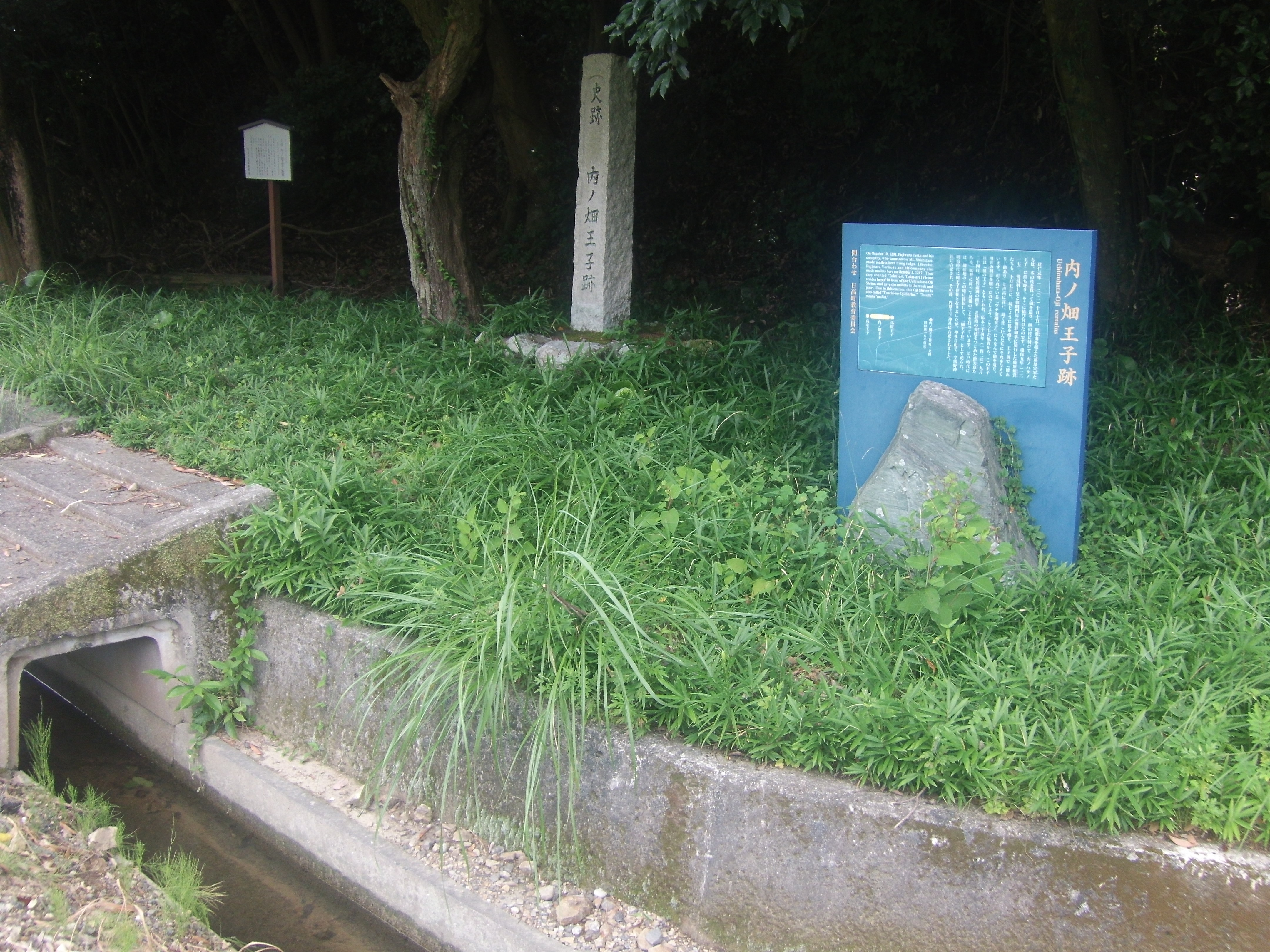 熊野古道・紀伊路の九十九王子の一つ内ノ畑王子跡(和歌山県日高町）